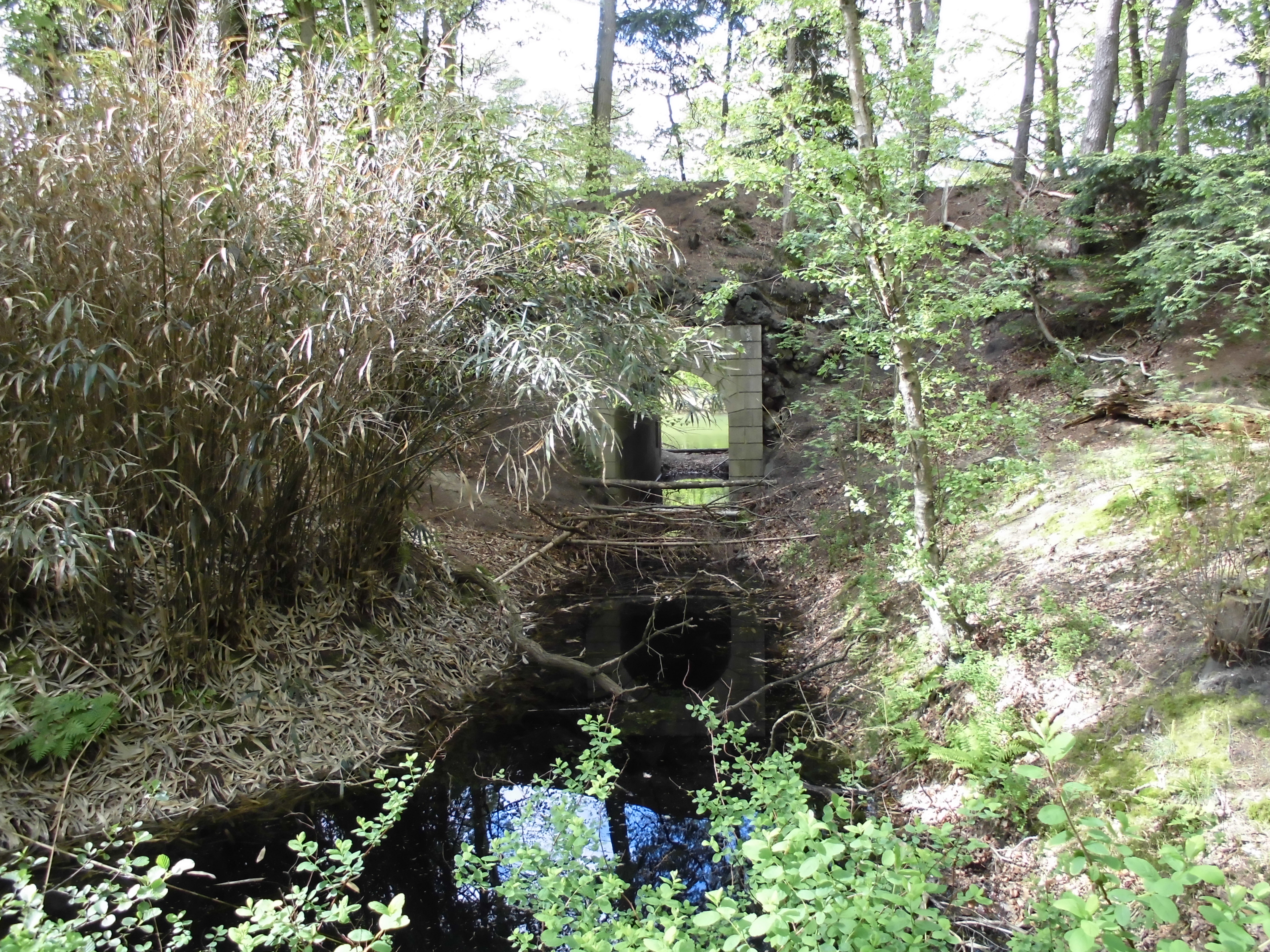 Heidestein, tunnel 2 zuid Driebergen-Rijsenburg